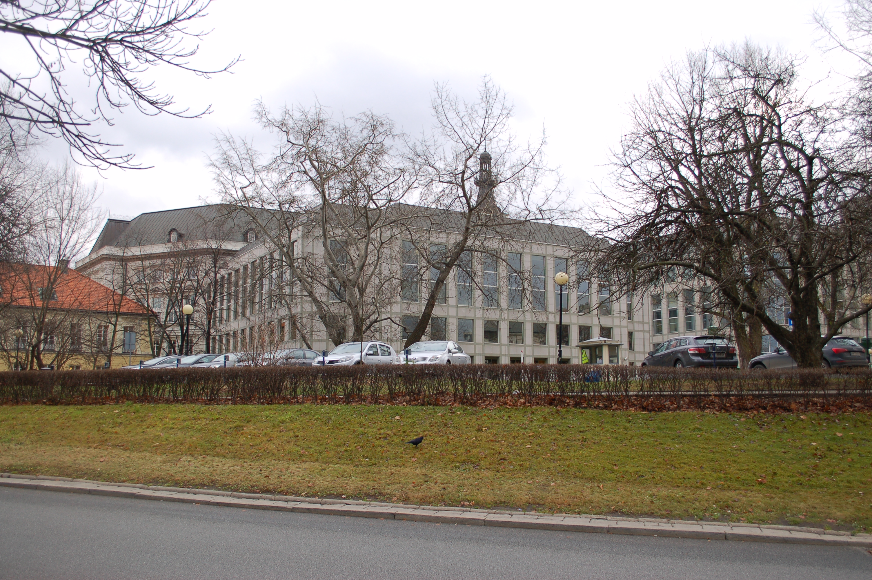 Modern part of rebuilt Jabłonski-palace (backside at Trasa W-Z)